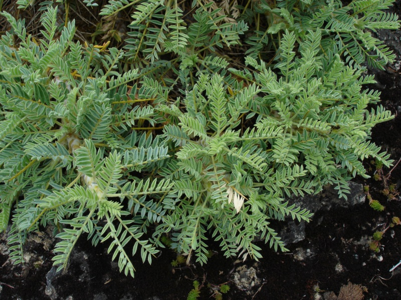 Astragalus microcephalus, , Jardin alpin, Jardin des Plantes de Paris